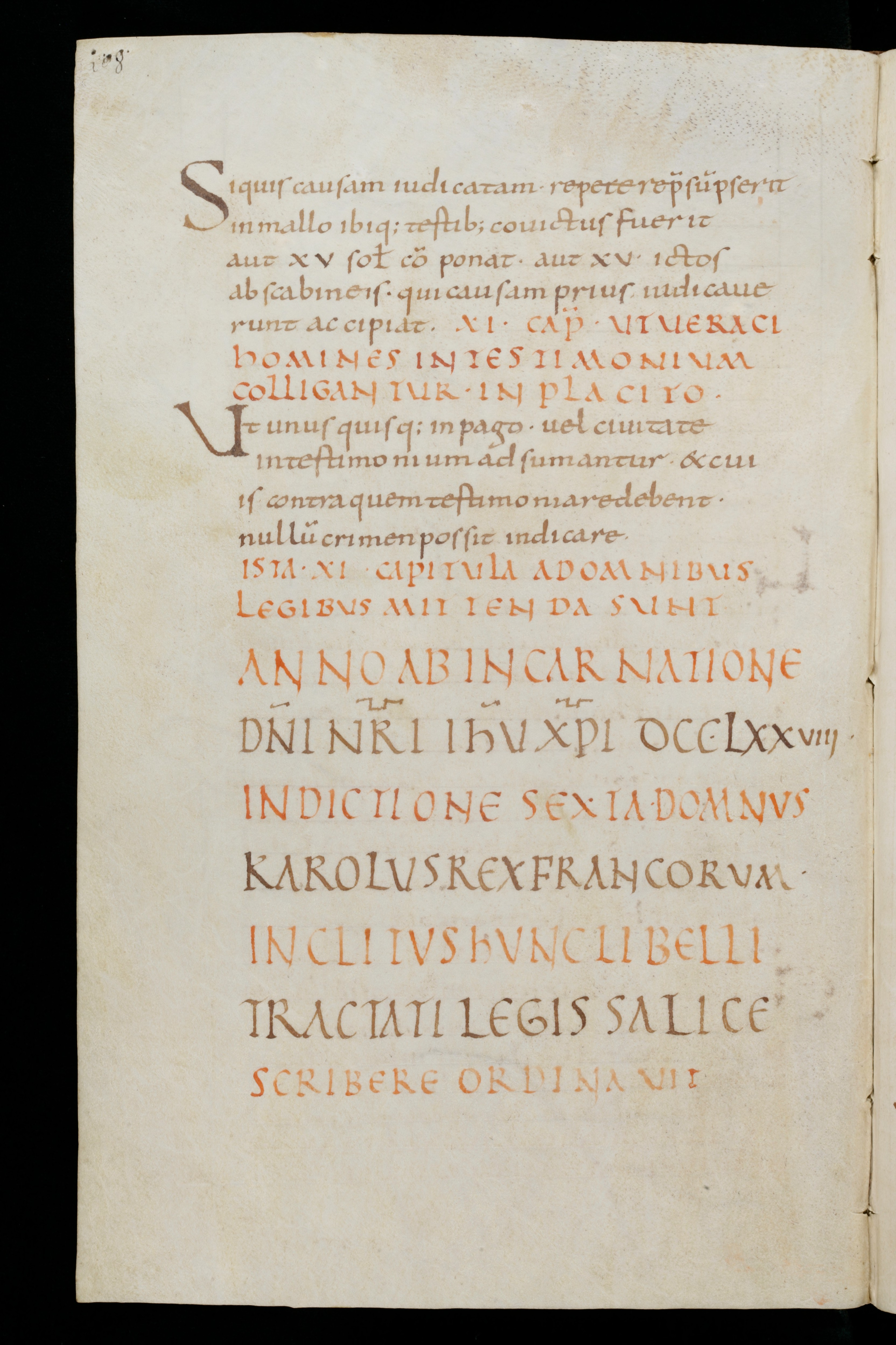 Lex Salica